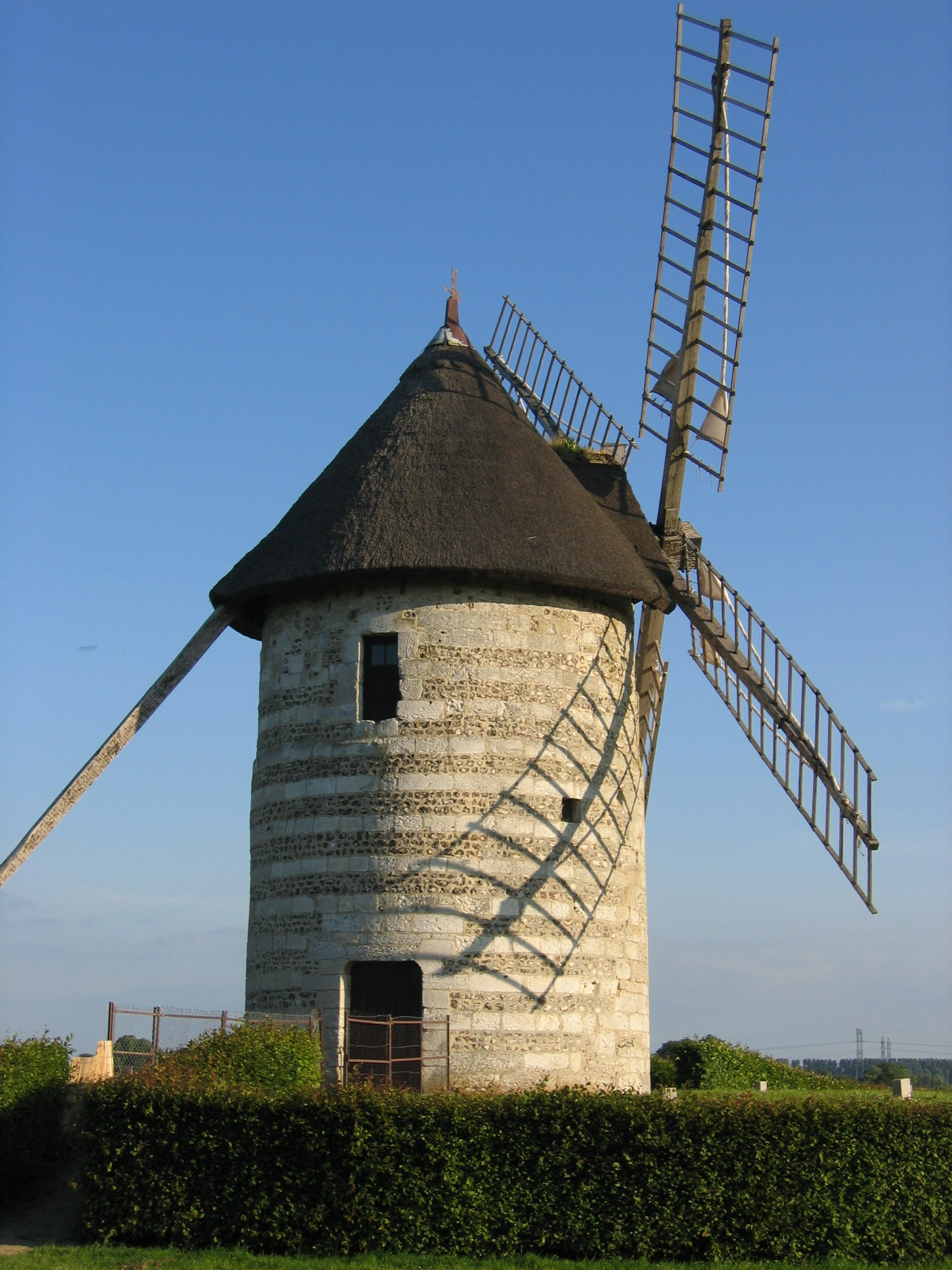 Photo du moulin d'Hauville (27), prise en juin 2005. Sawyer